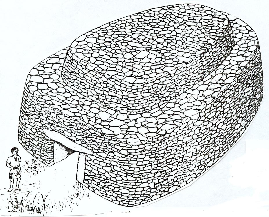 Cairn du dolmen des Erves, dessin extrait de « Premiers agriculteurs de la Mayenne, Recherches récentes sur le Néolithique 1978-1986 » Association d'Études préhistoriques et historiques des Pays de la Loire